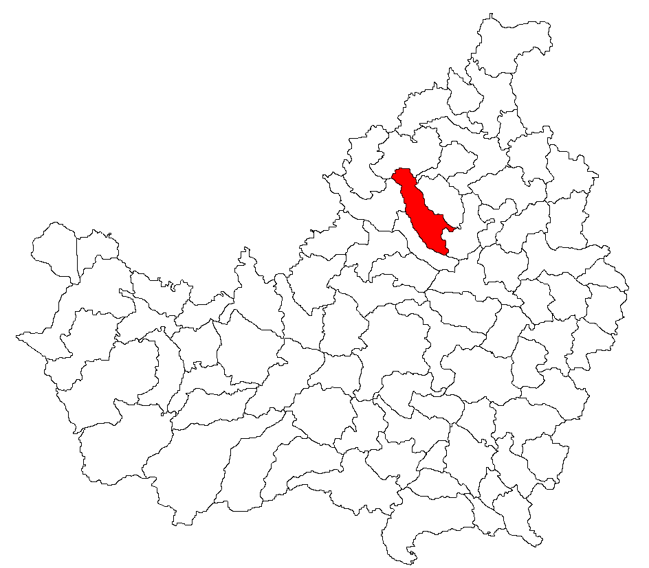 Categorie:Hărţi ale judeţului Cluj